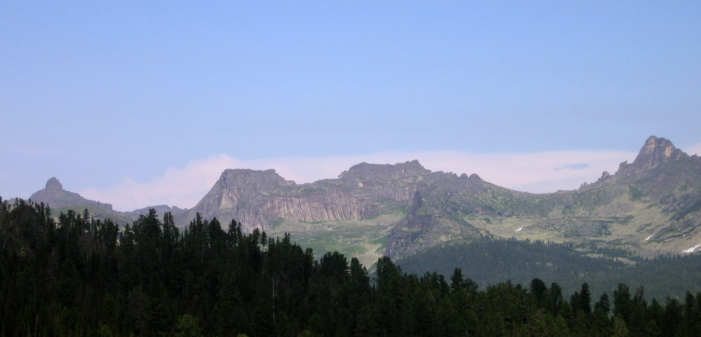 Массив Спящий Саян в природном парке "Ергаки"